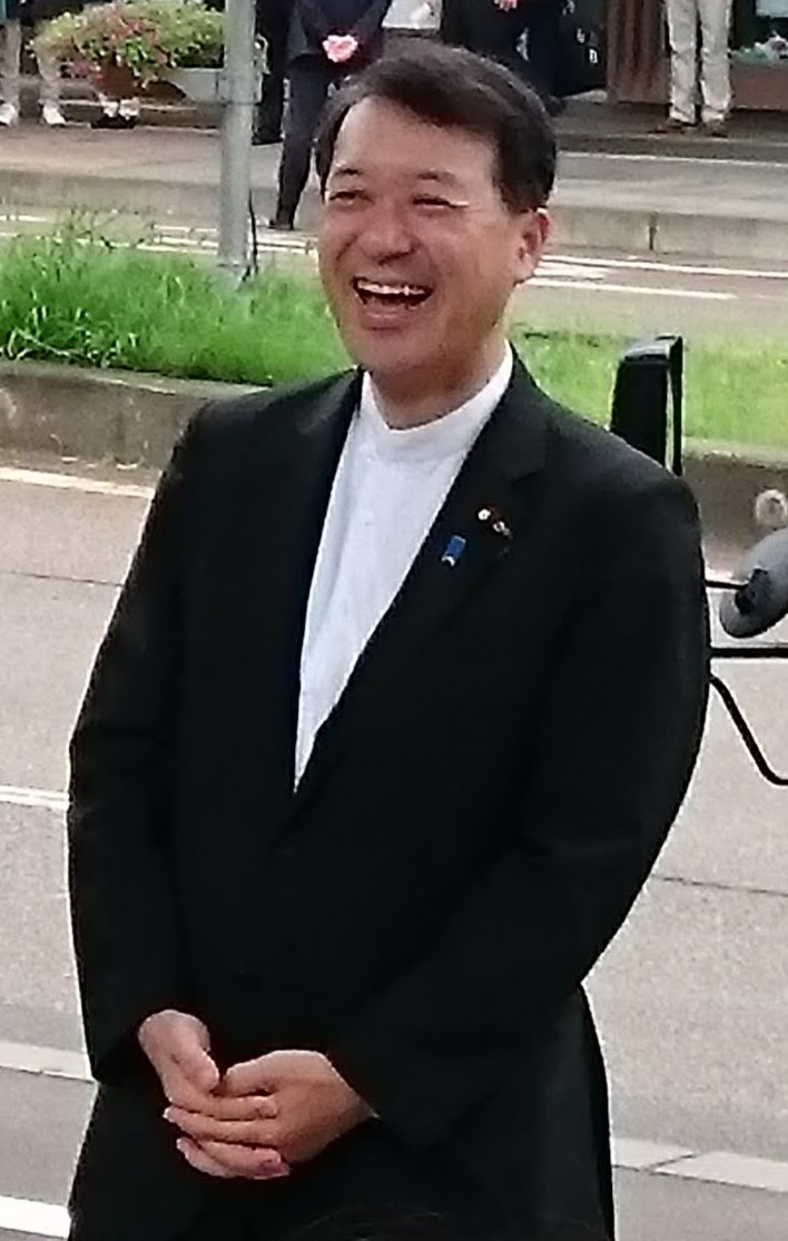 衆議院議員の泉田 裕彦（長岡市にて）